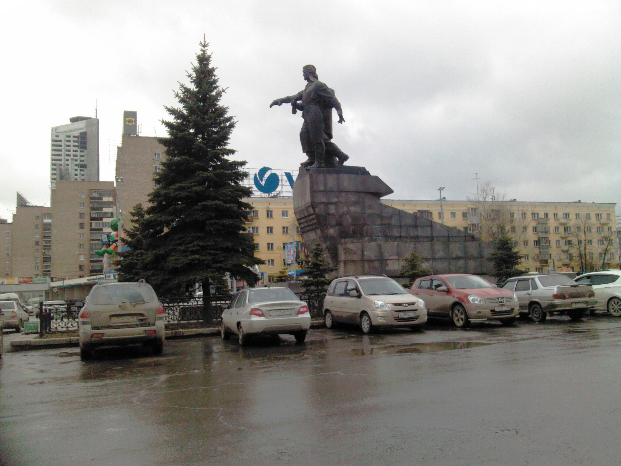 Zheleznodorozhnyy rayon, Yekaterinburg, Sverdlovskaya oblast', Russia